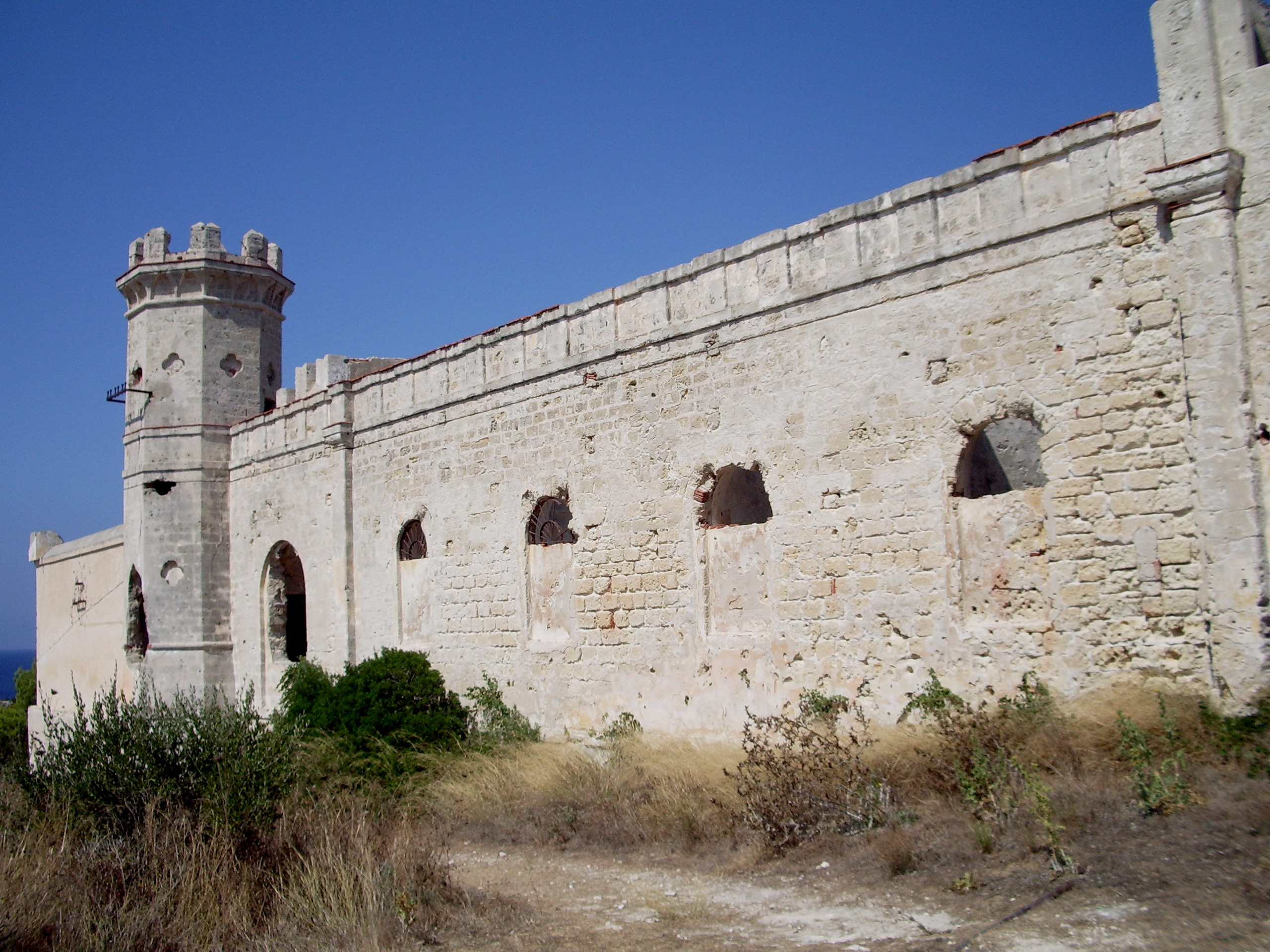 Particolare della facciata meridionale del Forte del Marchese sull'Isola di Pianosa (LI)